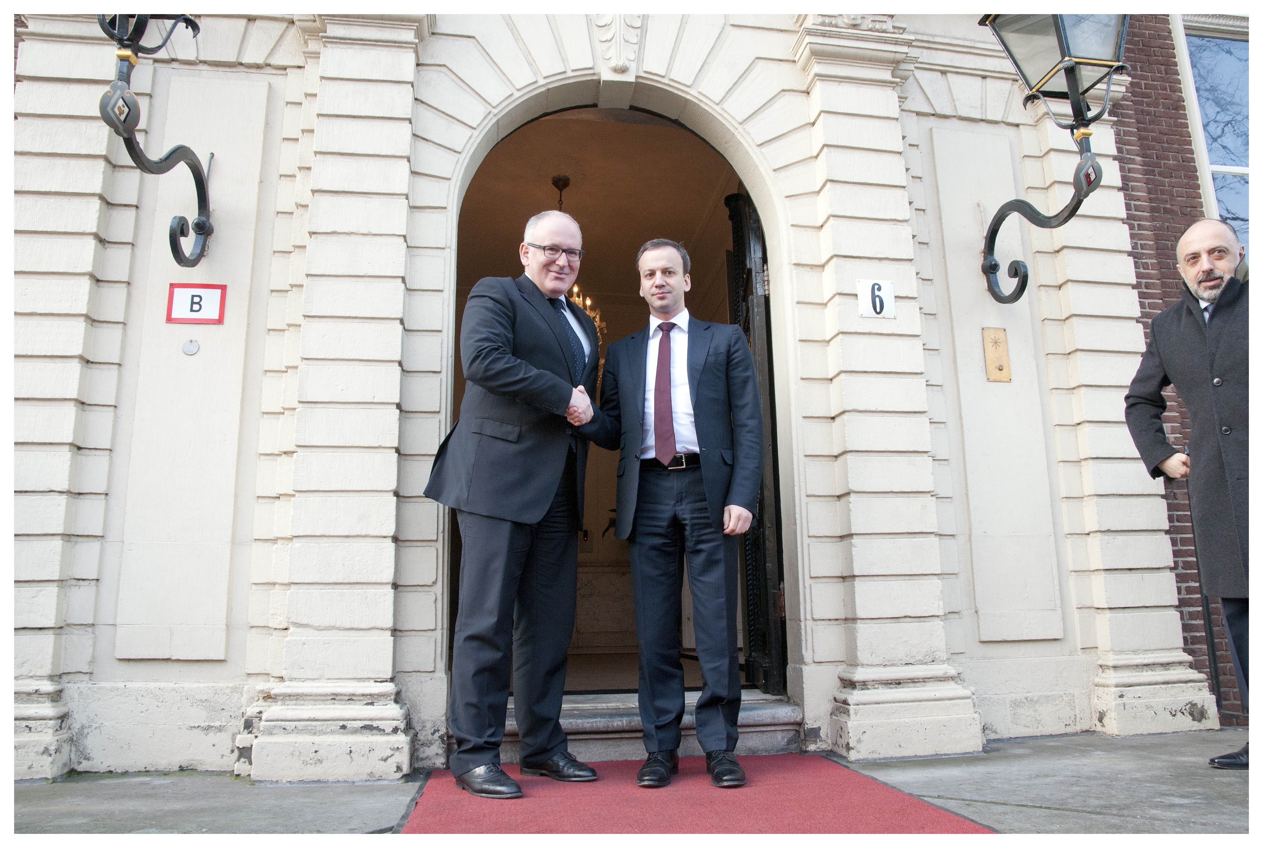 140129 Dvorkovich vice MP Rusland bij Timmermans 5570